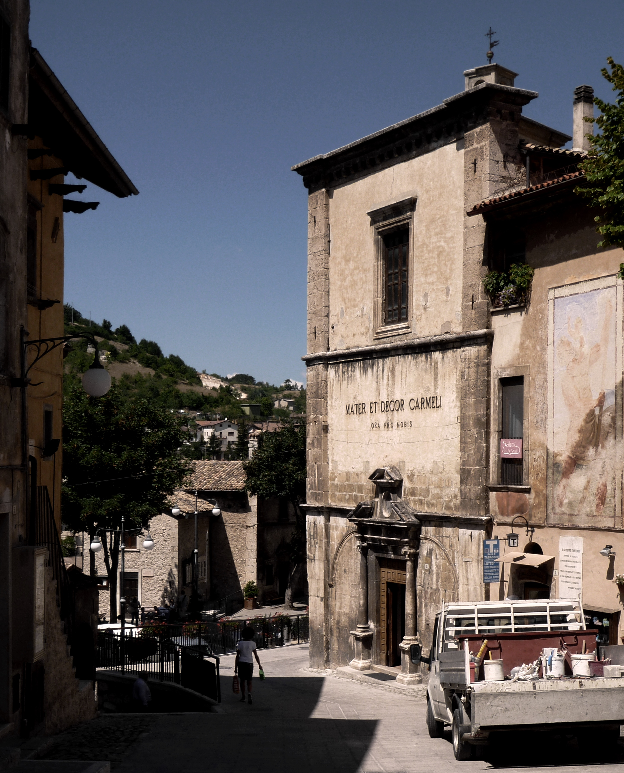 Facciata della chiesa della Madonna del Carmine a Scanno (AQ)